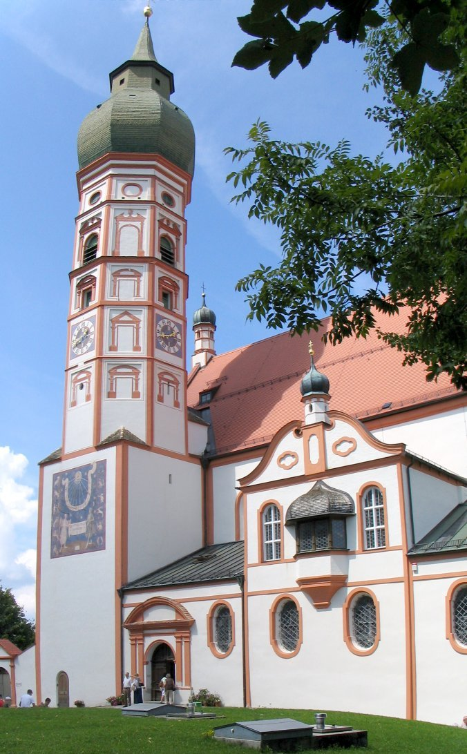 Kloster Andechs Bayern Deutschland / monastery Andechs Bavaria Germany August 2007 Quelle: selbst fotografiert Fotograf / Zeichner: Patrick Huebgen Upload : Pahu